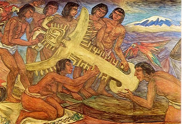 Pedro Nel Gómez. Fragmento del mural Historia económica e industrial del Departamento de Antioquia, Estación Parque Berrío, antiguo Banco Popular